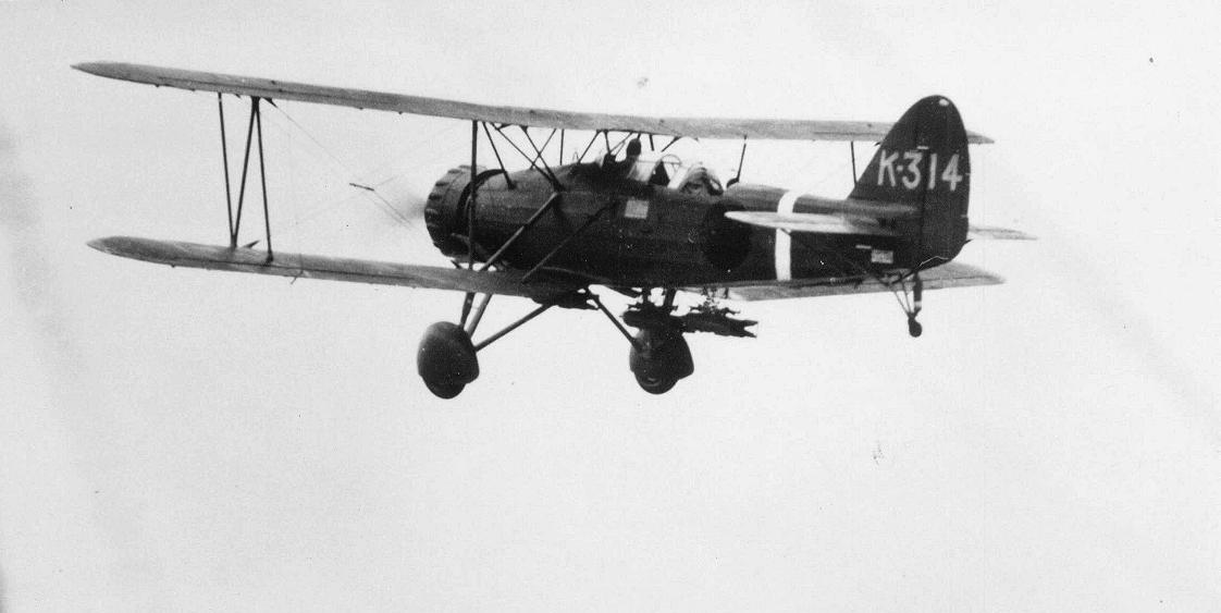 空母「加賀」所属の、九六式艦上攻撃機。